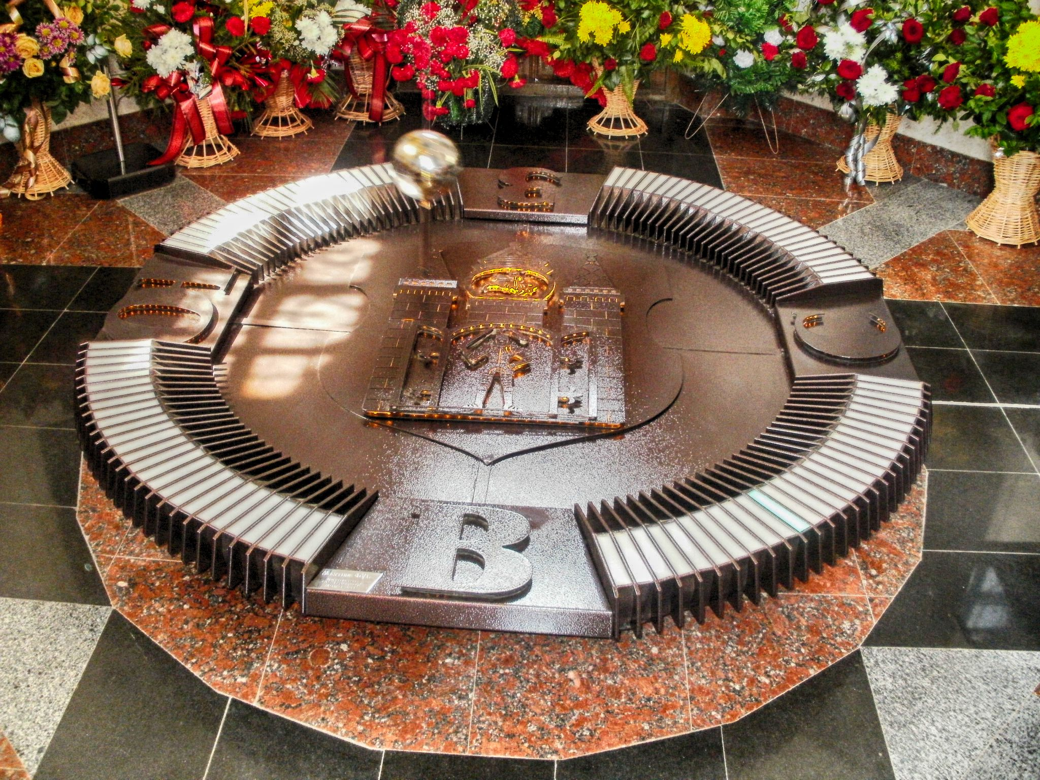 Беларуская (тарашкевіца): Мэмарыяльны комплекс -Буйницкае поле